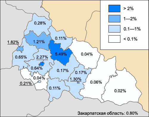 Расселение русин в Закарпатской области по районам в процентах согласно данным переписи на Украине в 2001 году.